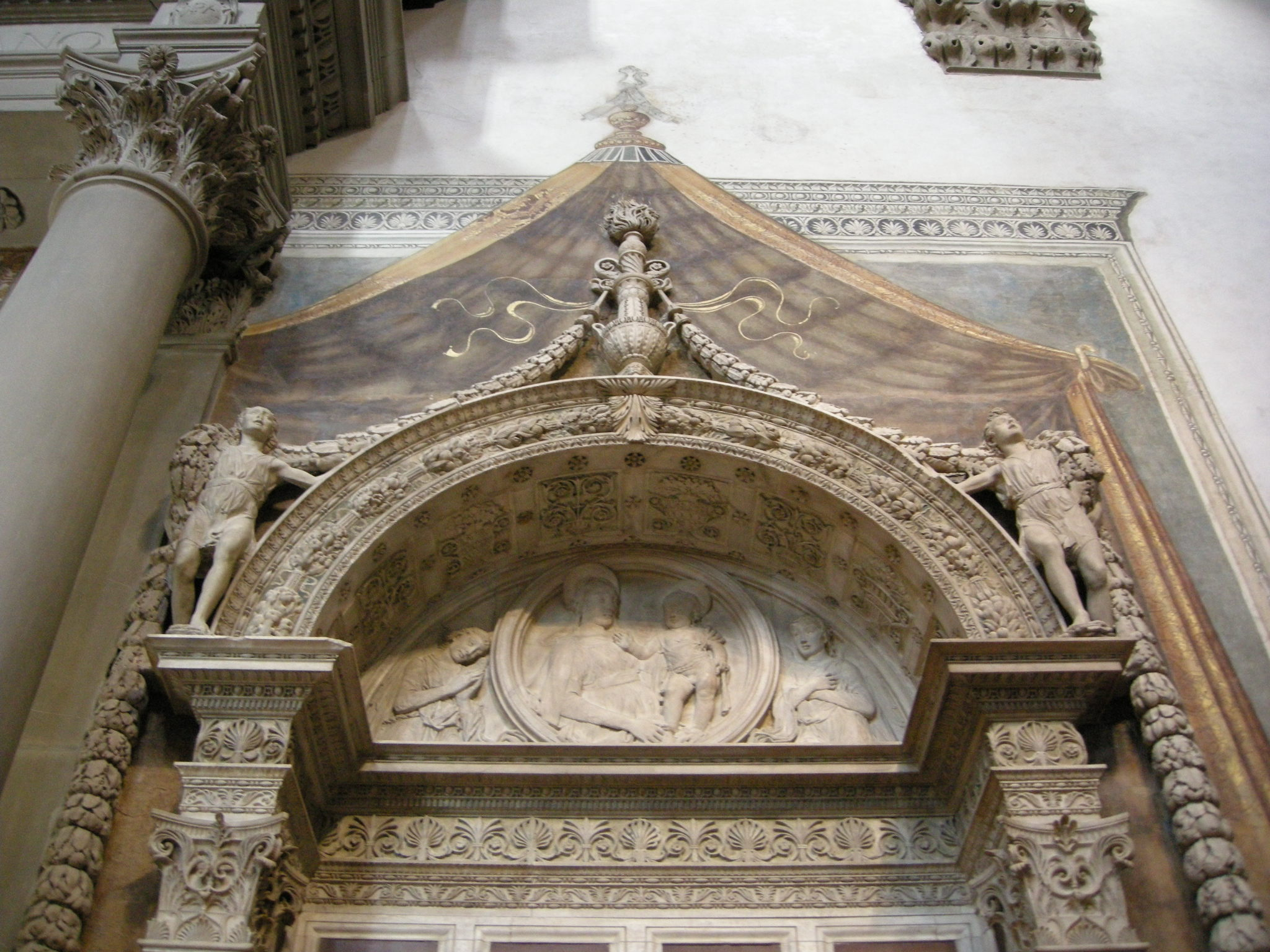 Santa croce, navata, tomba di carlo marsuppini